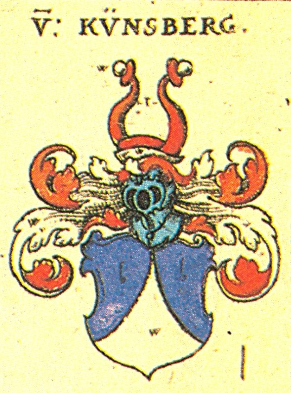 Ritterschaft und Adel in Franken von Kürnsberg